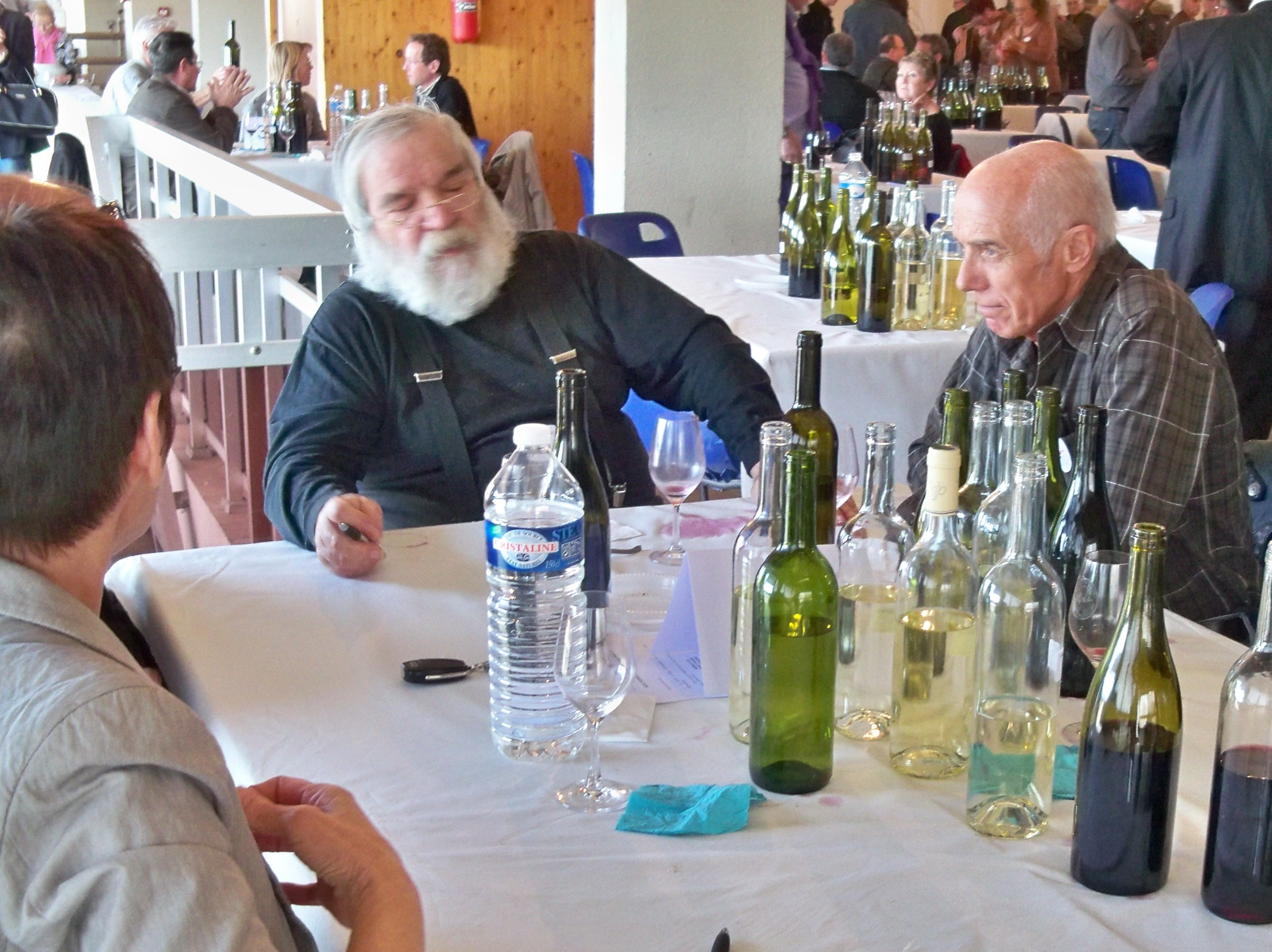 Concours des vins du Grand Delta, dans le cadre de la Foire exposition d'Avignon (84) : discussion